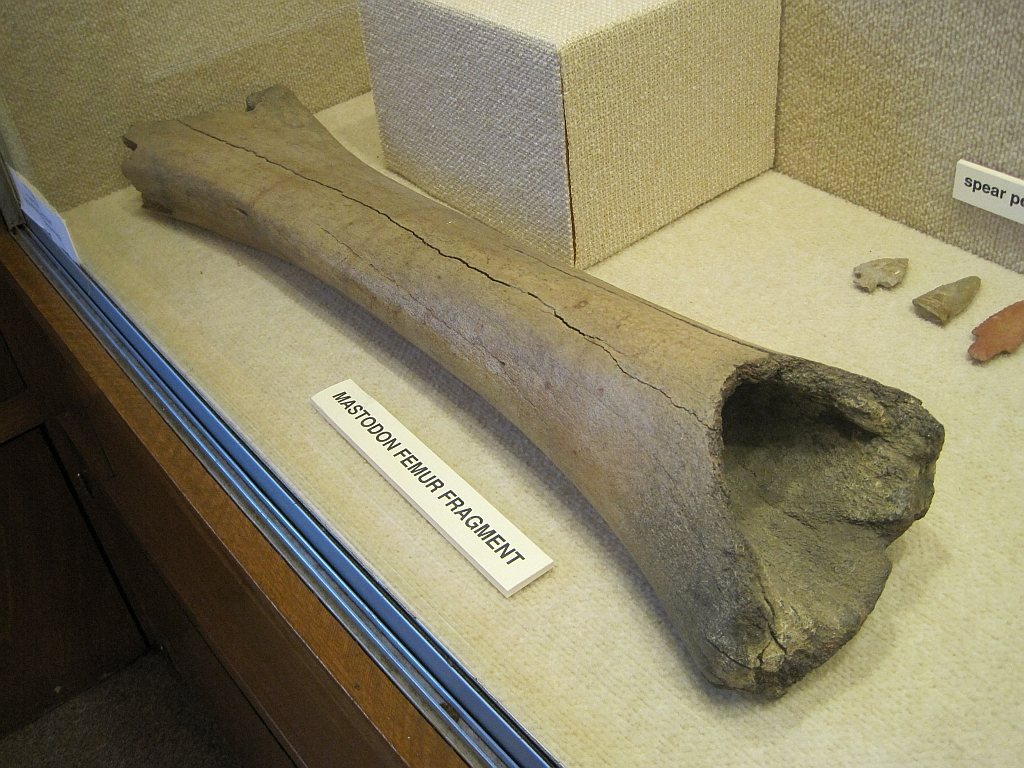 Hampson Museum State Park, Arkansas. Island 35 Mastodon femur